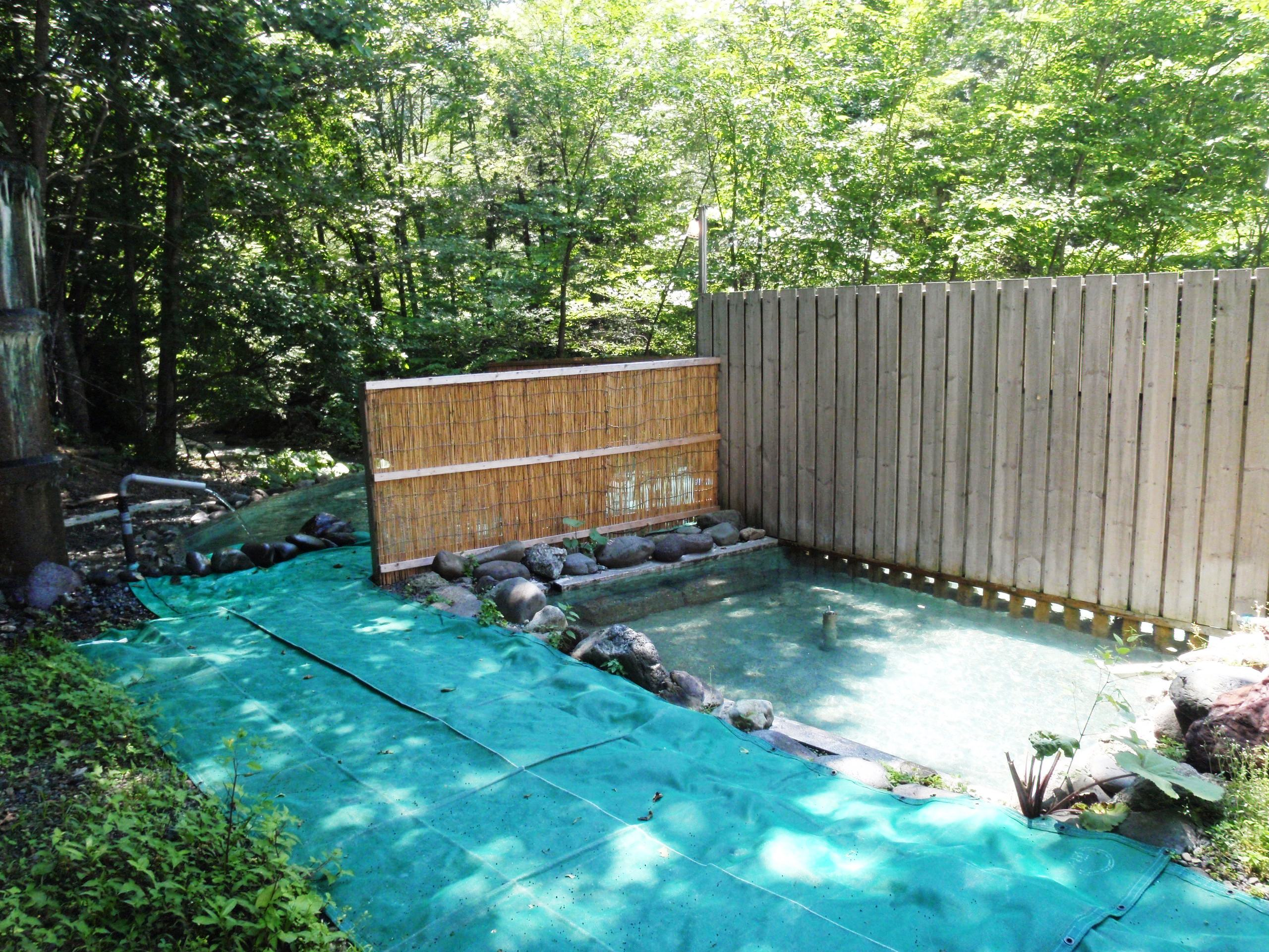 オソウシ温泉露天風呂